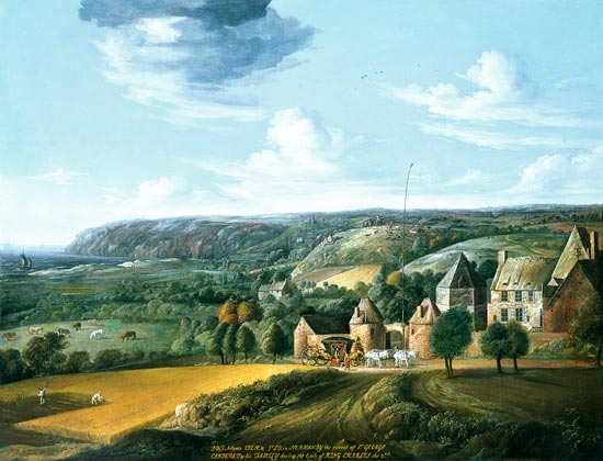 Peinture du Manoir de Potrel, département de la Manche.